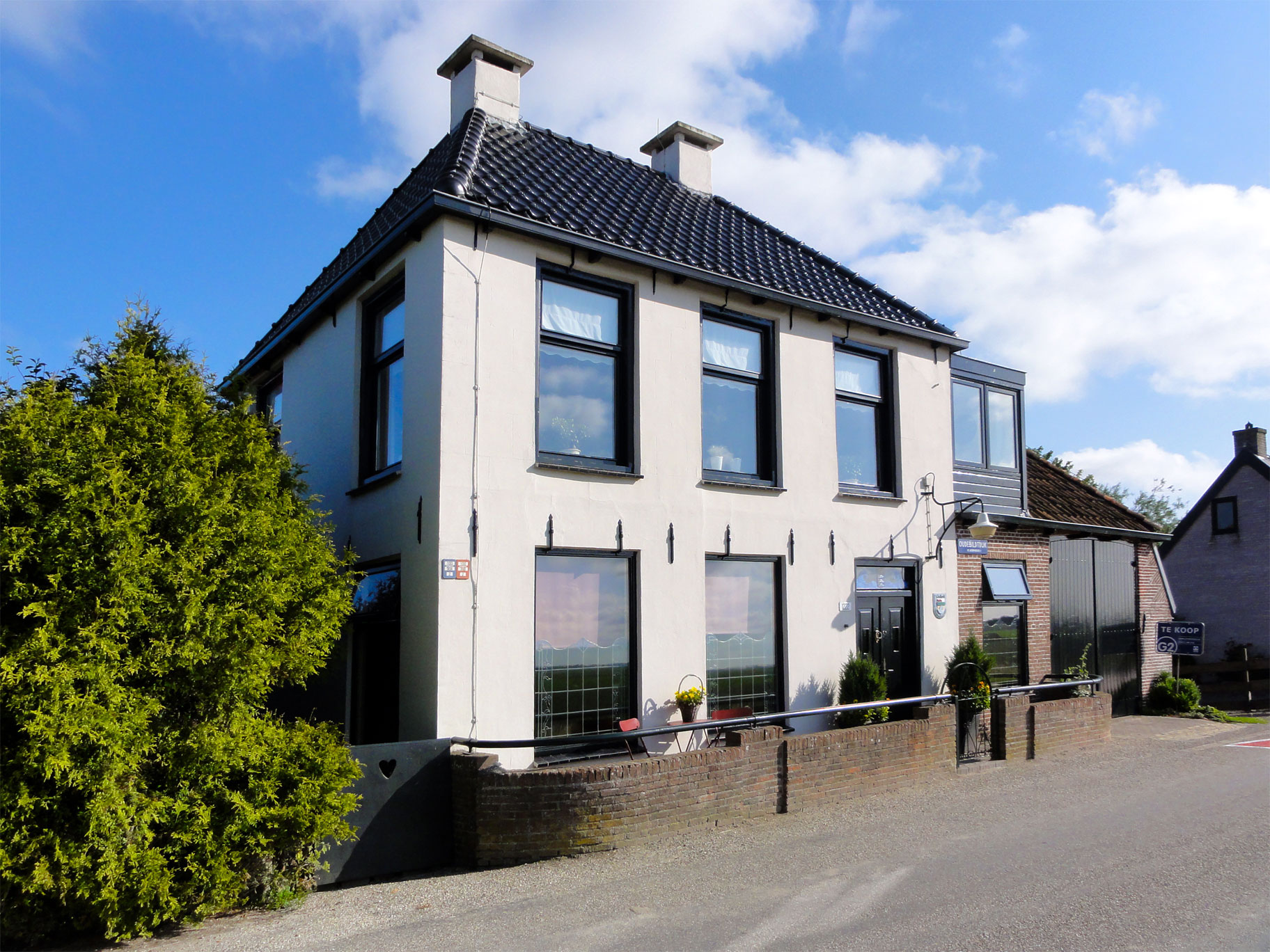 Oudebildtdijk 1222 in Sint-Jacobiparochie